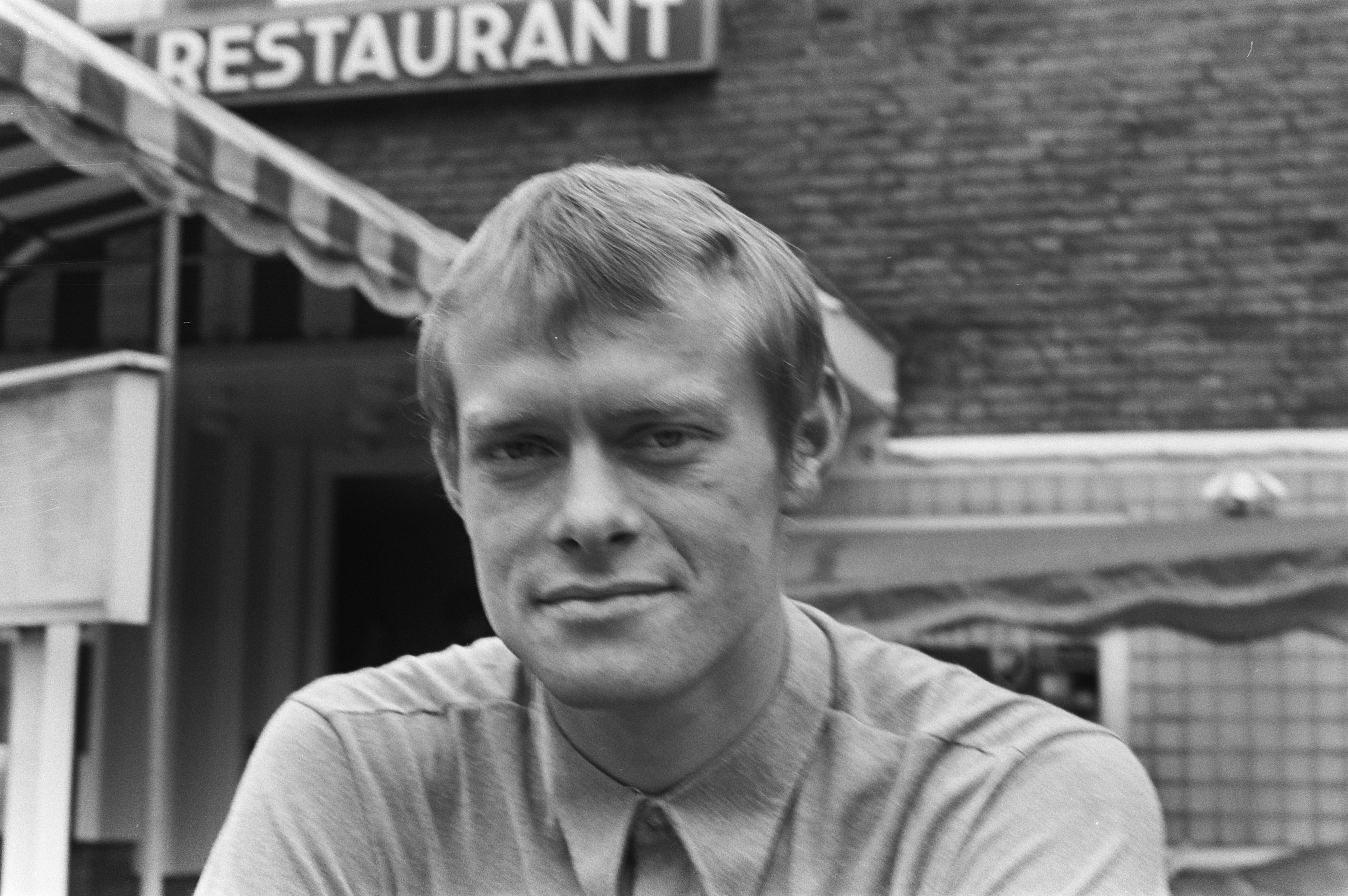 Collectie / Archief : Fotocollectie Anefo Reportage / Serie : [ onbekend ] Beschrijving : Opdracht Nordisk; Deense voetballers PSV: H. Jensen , kop Datum : 19 augustus 1970 Trefwoorden : sport, voetballers Persoonsnaam : H. Jensen Instellingsnaam : PSV Fotograaf : Evers, Joost / Anefo Auteursrechthebbende : Nationaal Archief Materiaalsoort : Negatief (zwart/wit) Nummer archiefinventaris : bekijk toegang 2.24.01.05 Bestanddeelnummer : 923-7664